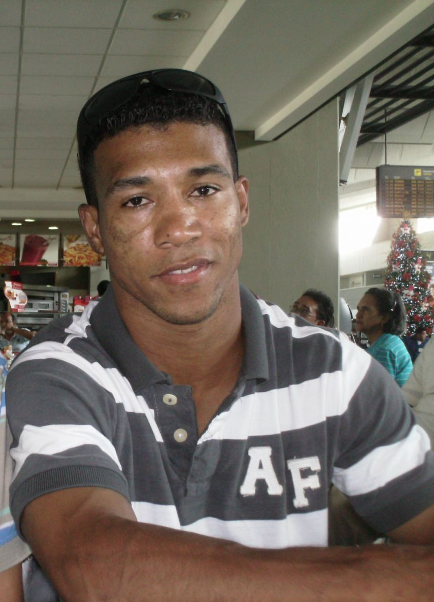 Esta fotografía fue tomada en el aereopuerto Bonilla Aragón de Palmira Valle